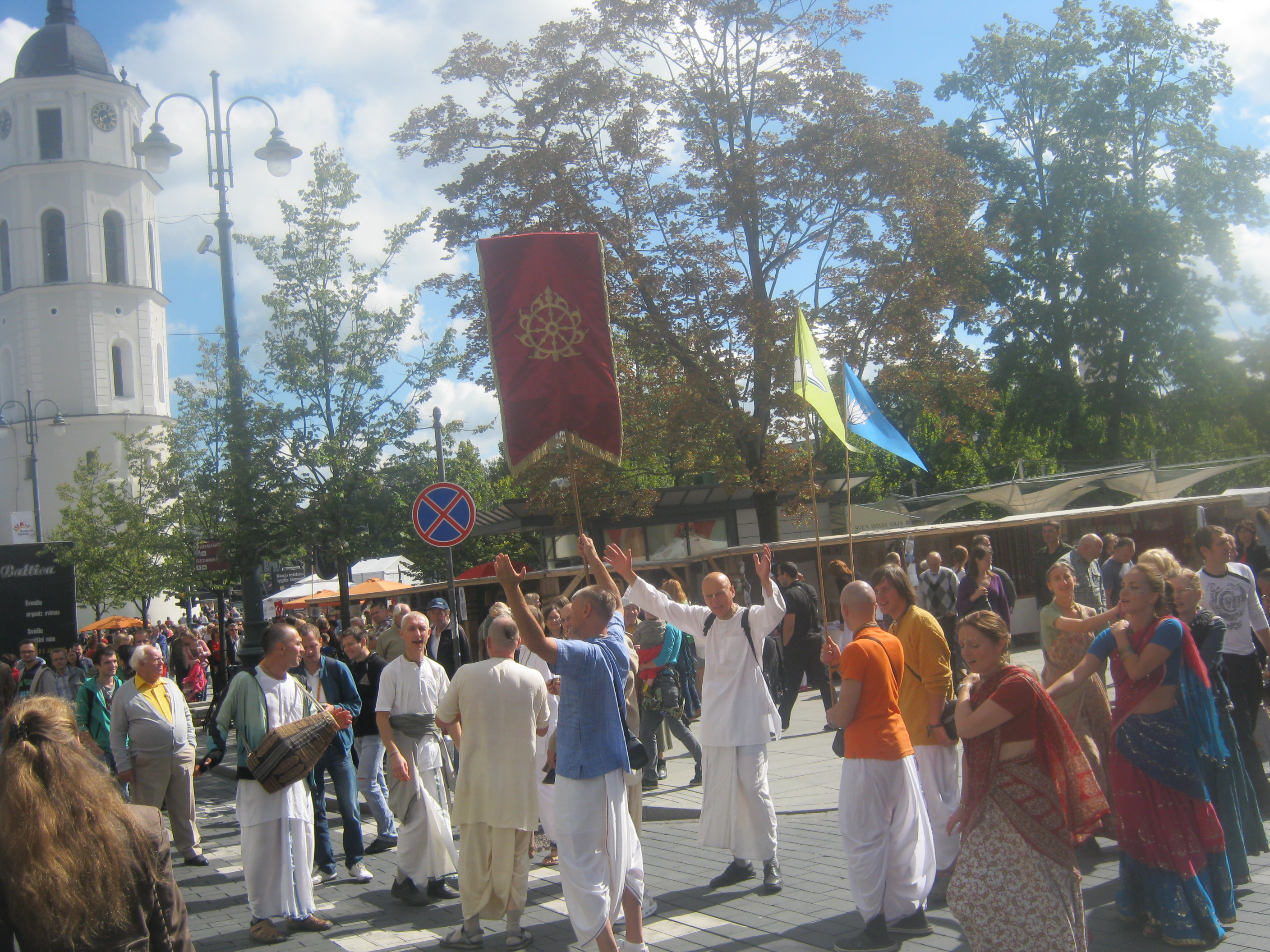 Sostinės dienos 2012